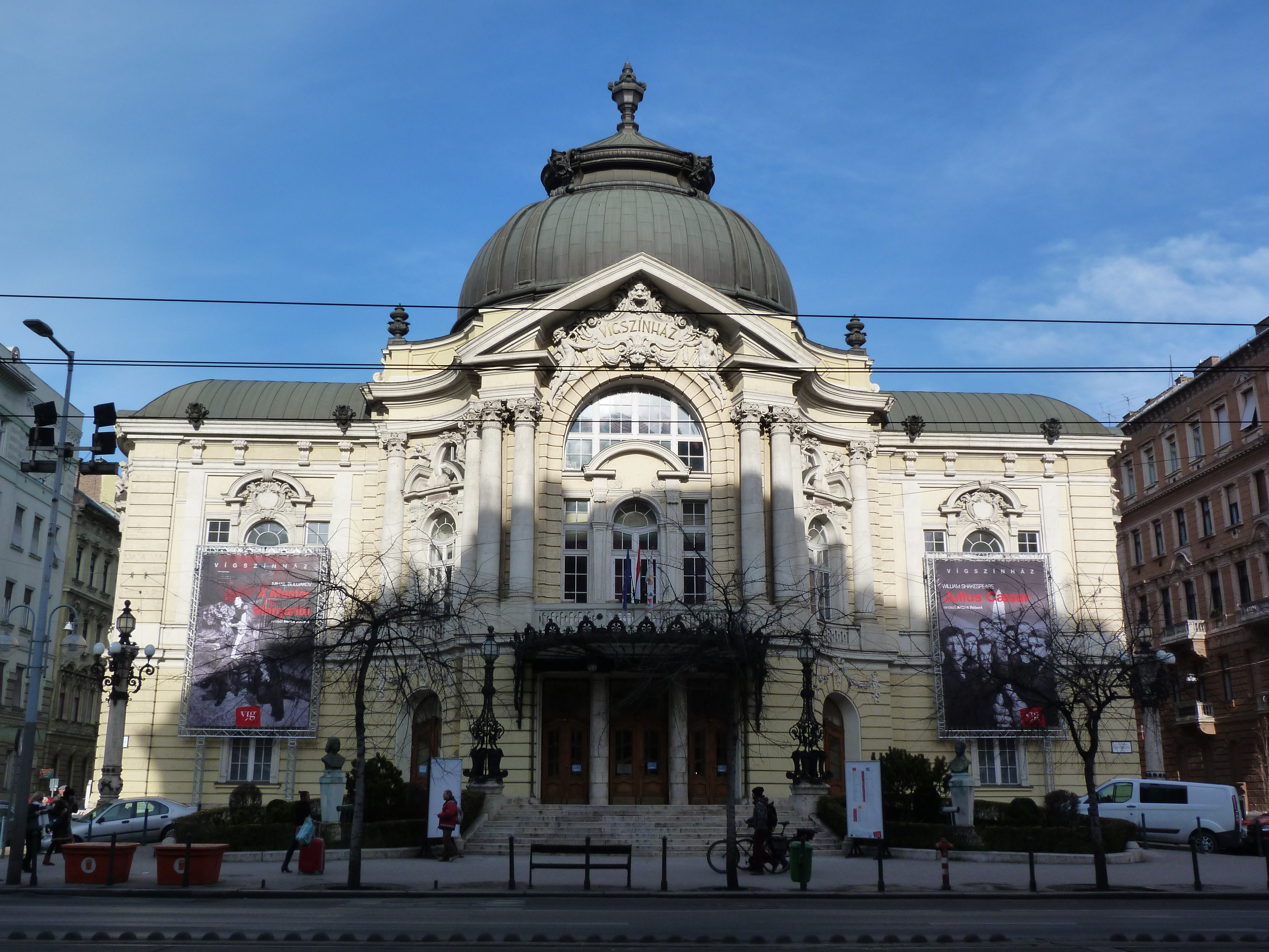 A felvétel 2015. január 26-án készült Budapesten. Vígszínház. Mihail Bulgakov Mester és Margarita című könyve alapján színmű plakátja a színház épületén. ©© Derzsi Elekes Andor, Budapest, 2015, A kép egészben, vagy részletekben másolását, bármilyen úton történő sokszorosítását és felhasználását a szerző ellenérték nélkül, jogutódjaira is kihatóan megengedi. Az engedély kiterjed a kereskedelmi célú hasznosításra is. Kéri azonban nevének feltüntetését a felhasználás során. A Metapolisz sorozat valamennyi képe és filmje Creative Commons alatti valamint kereskedelmi - for profit - célra is felhasználható. Ajánlott hivatkozás: Derzsi Elekes Andor: Metapolisz DVD line